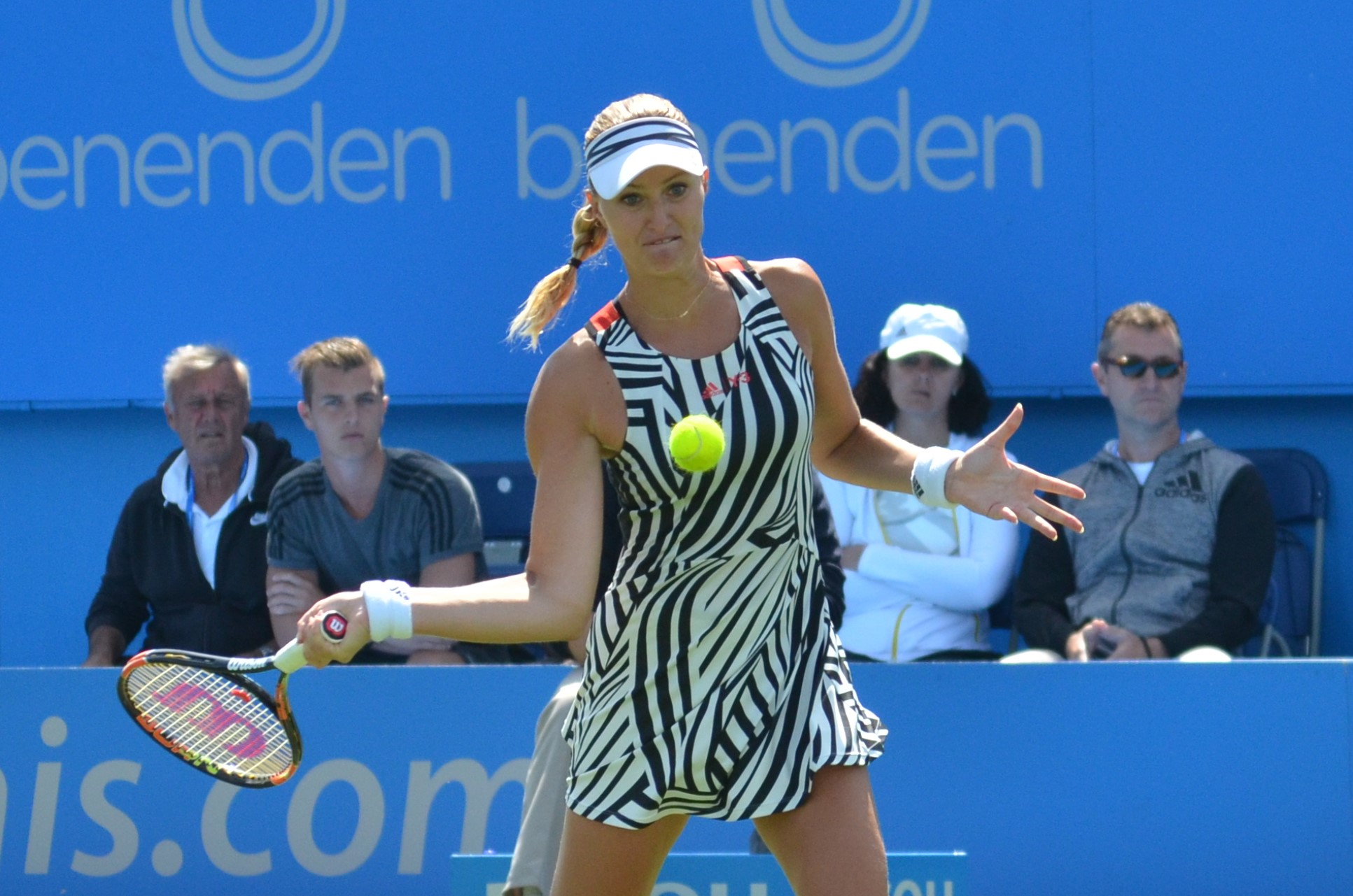 DSC_1789 (2)